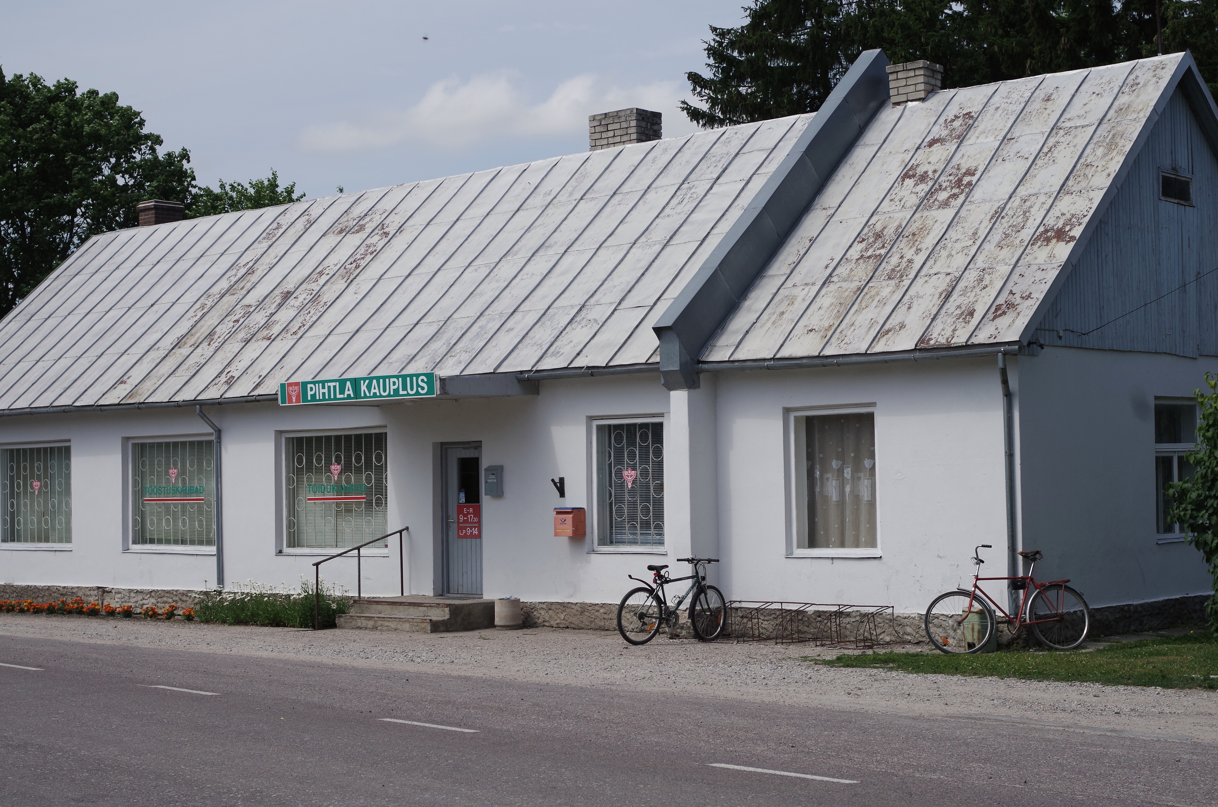 Pihtla pood Saaremaal Pihtla vallas. (2014)